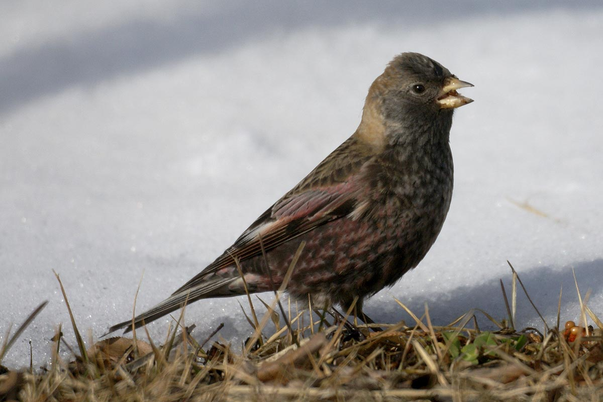 Leucosticte arctoa